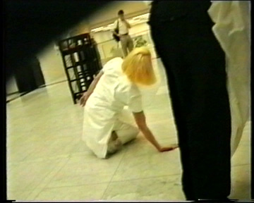 Videostill